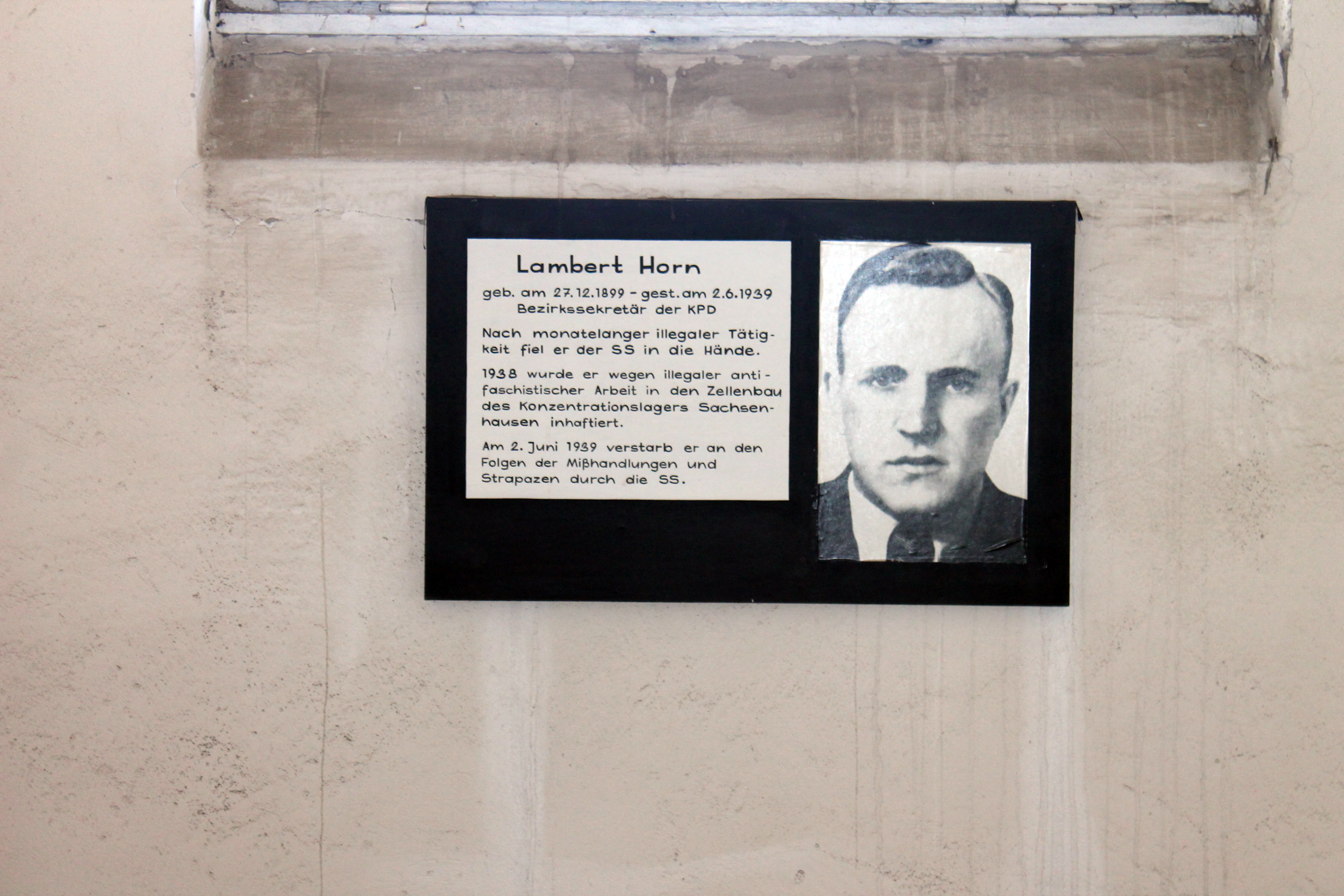 Im gedenken an Lambert Horn, Aushang im Zellenbau des KZ-Sachsenhausens. Lambert Horn (* 27. Dezember 1899 in Düsseldorf; † 2. Juni 1939 im KZ Sachsenhausen) war ein deutscher Politiker (KPD).